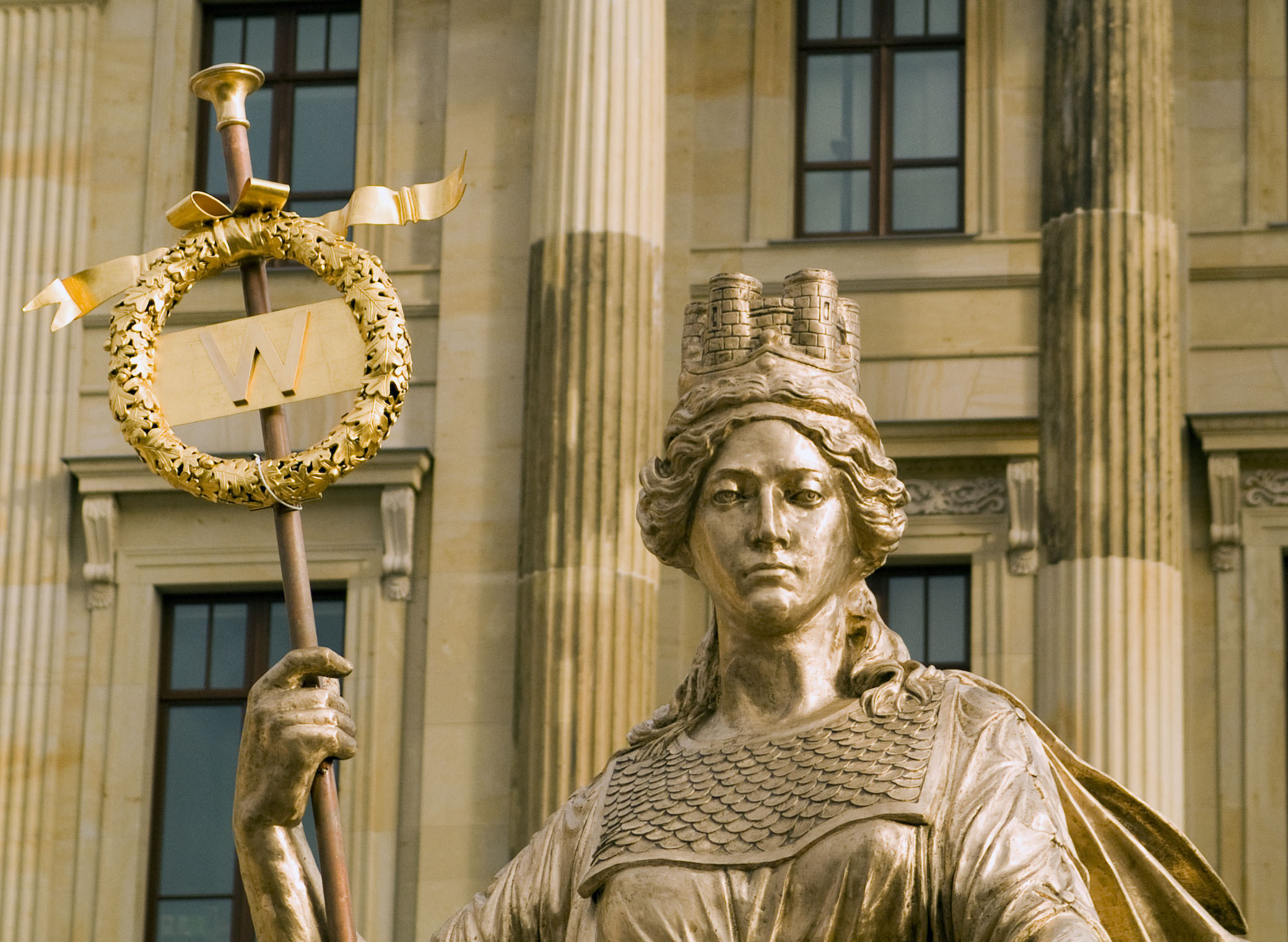 Die Brunonia vor der Aufstellung auf dem Braunschweiger Schloss am 18.10.2008